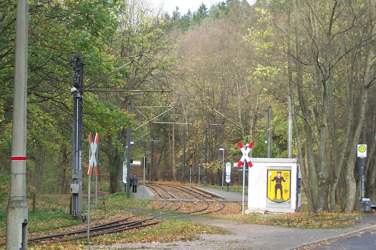 Am Haltepunkt in Reinhardsbrunn (beim Bahnhof und Buswendestelle).